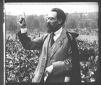 Антонин Яноушек. Кадр из кинохроники